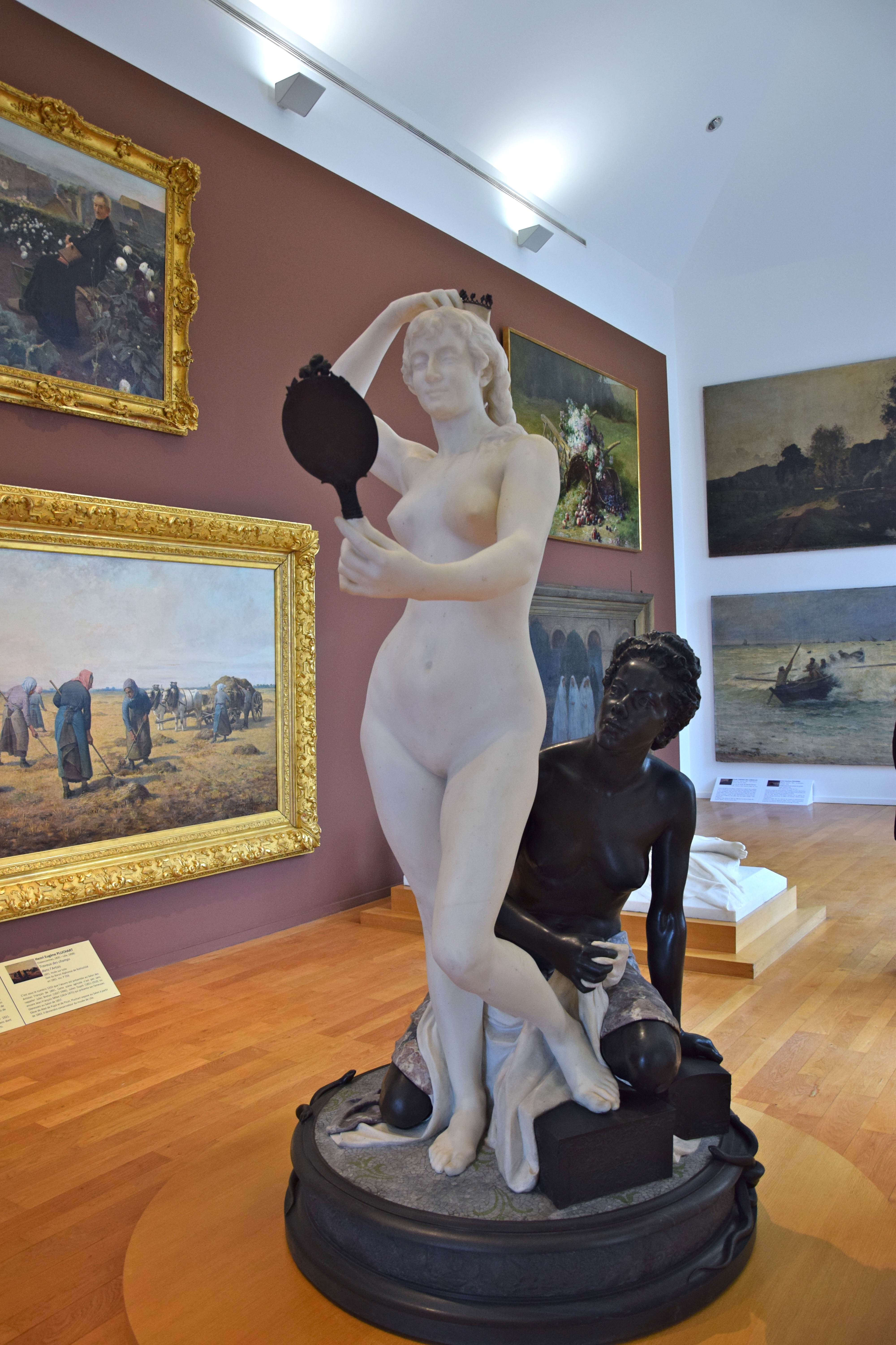 Le miroir de Émile Joseph Carlier